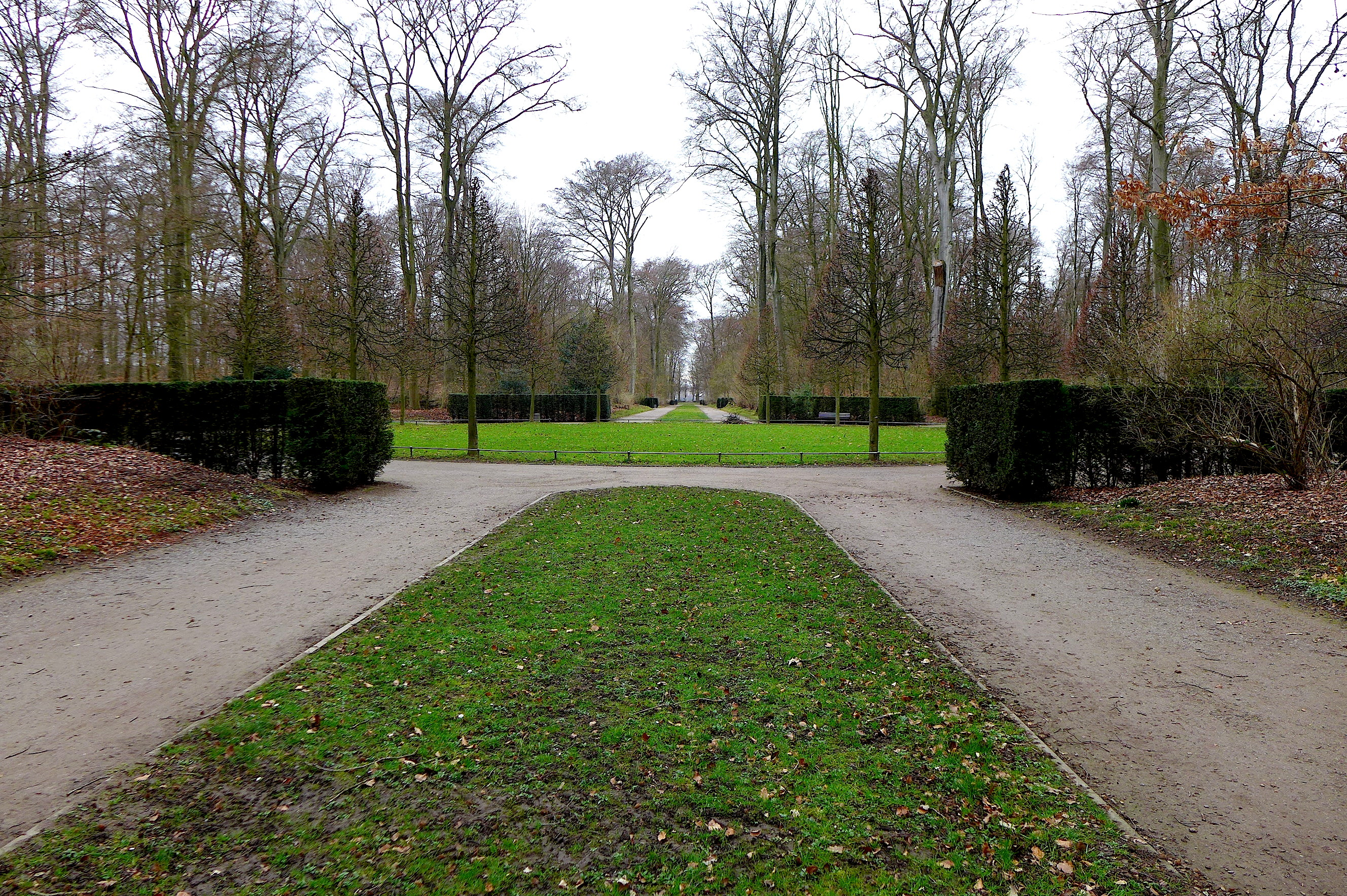 Охотничья звезда (элемент парковой ландшафтной архитектуры) в замковом парке Бенрата (Дюссельдорф). Вид центра звезды со стороны Главной (Замковой) аллеи.